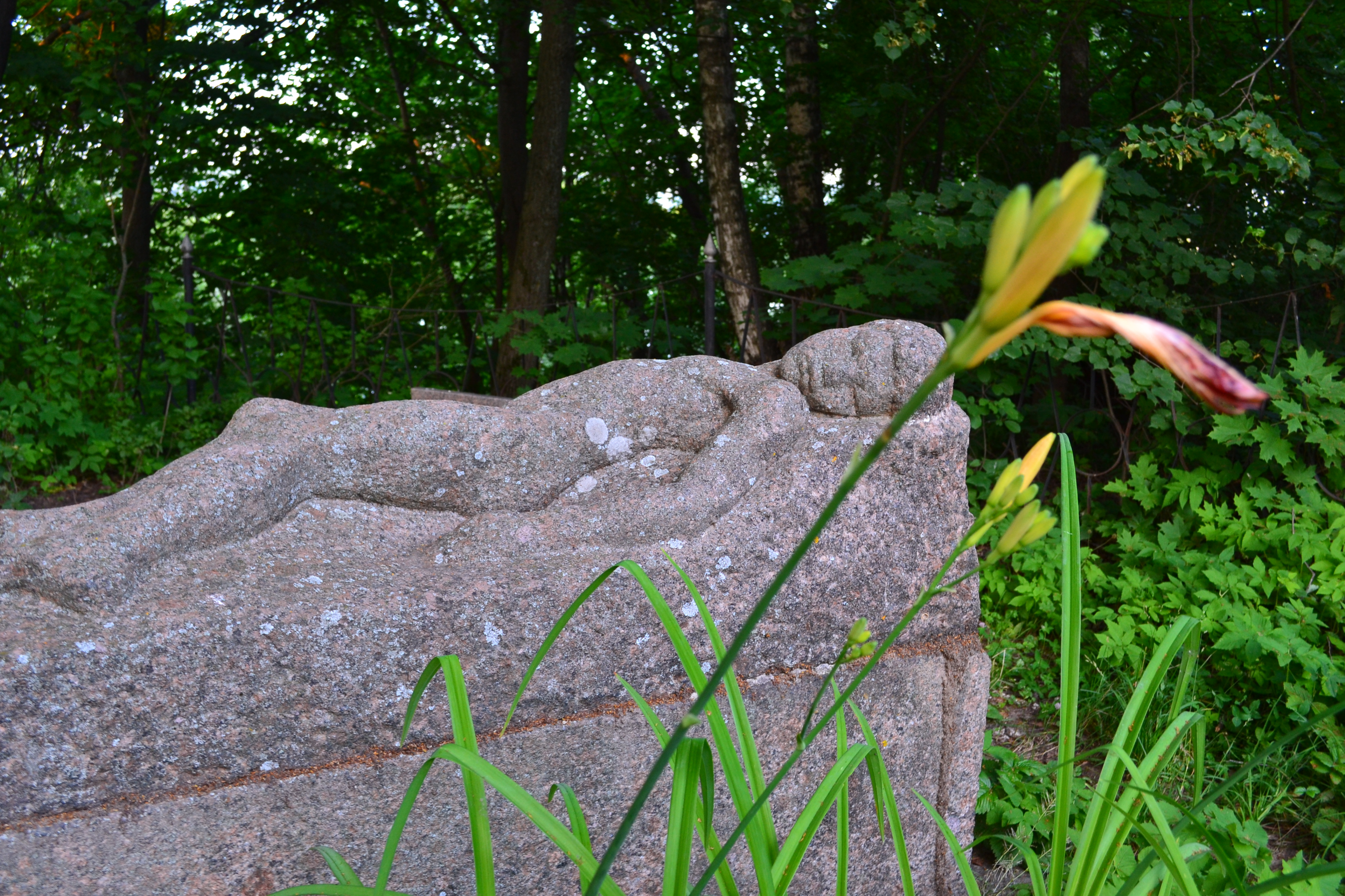 Надгробный памятник В.Э. Борисова-Мусатова "Уснувший мальчик"